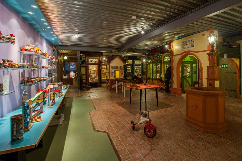 Een blik op het interieur van het museum.